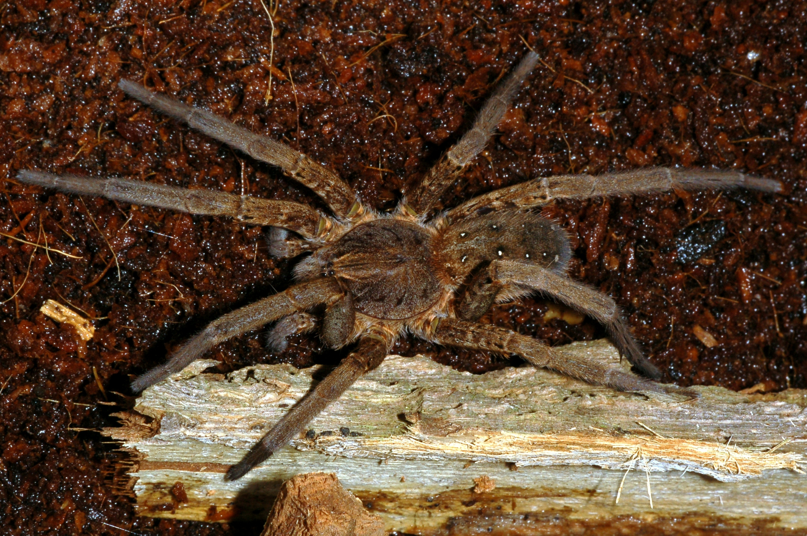 Wasserjagdspinne Ancylometes bogotensis (Fam. Ctenidae) in Gefangenschaft, Museum Wiesbaden, Deutschland